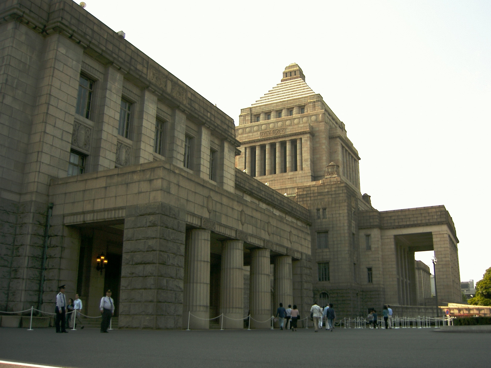 東京都千代田区永田町一丁目7番1号 国会議事堂 衆議院側の画像。 * 撮影者: DS80s(投稿者本人) * 撮影年月: 2007年5月